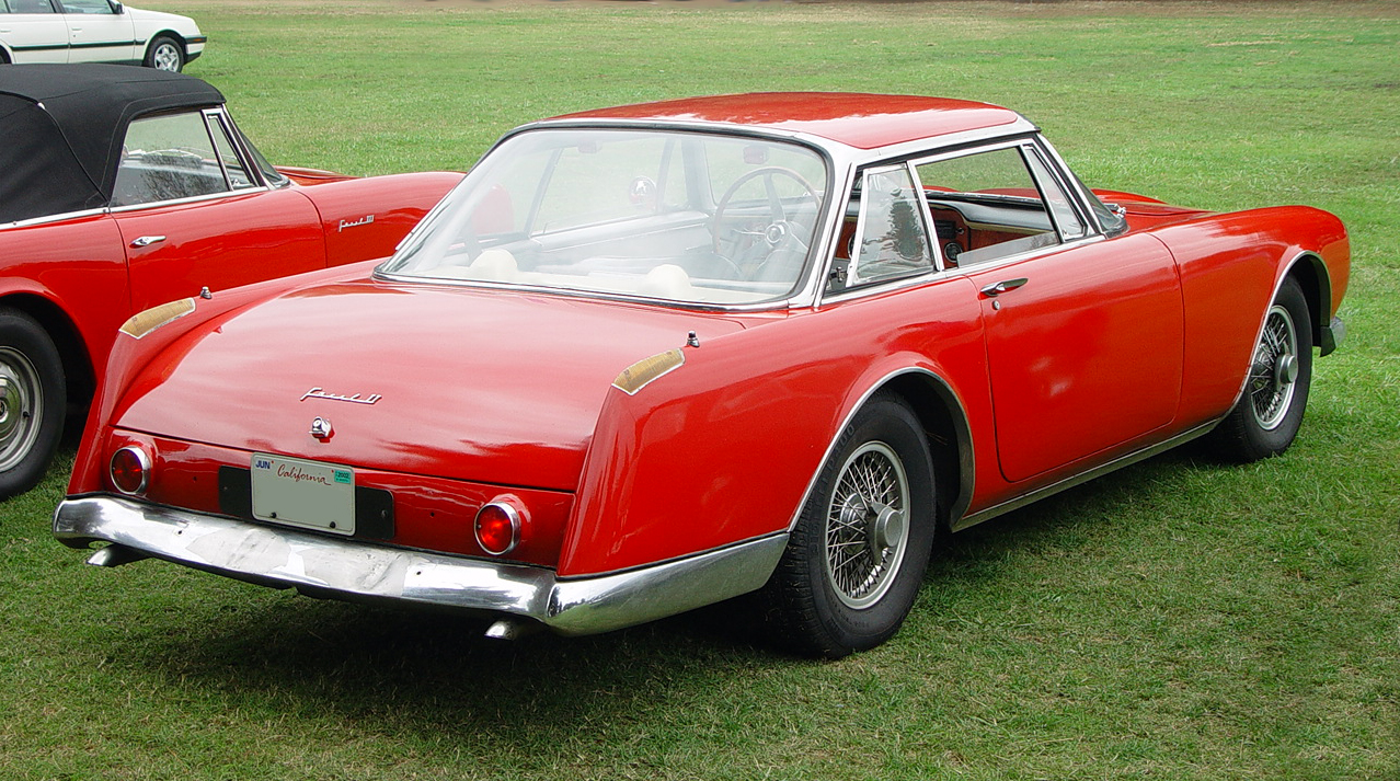 Facel Vega Facel II